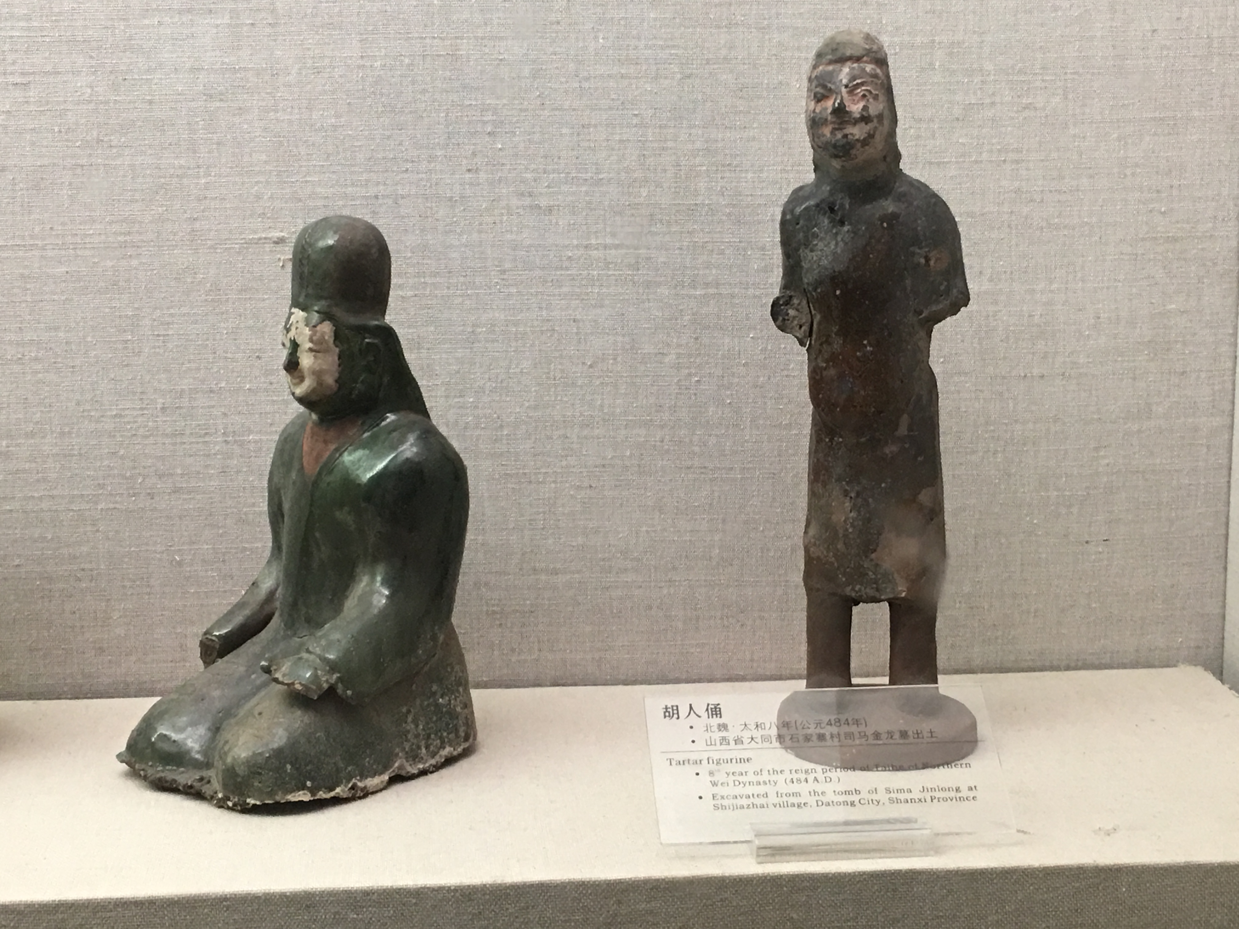 北魏胡人俑，大同市司马金龙墓出土，现藏于山西博物院